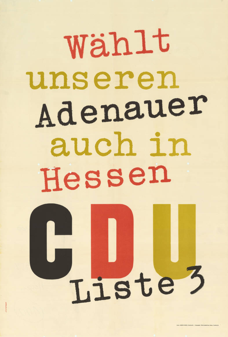 Wählt unseren Adenauer auch in Hessen CDU Liste 3 Abbildung: Nationalfarben Plakatart: Kandidaten-/Personenplakat ohne Porträt Künstler_Grafiker: Schwabe, Heinz Auftraggeber: CDU / Landesleitung Hessen, Frankfurt/M Drucker_Druckart_Druckort: Agenor-Druck, Frankfurt/M Objekt-Signatur: 10-007 : 100 Bestand: Landtagswahlplakate Hessen (10-007) GliederungBestand10-18: Landtagswahlplakate Hessen (10-007) » CDU Lizenz: KAS/ACDP 10-007 : 100 CC-BY-SA 3.0 DE